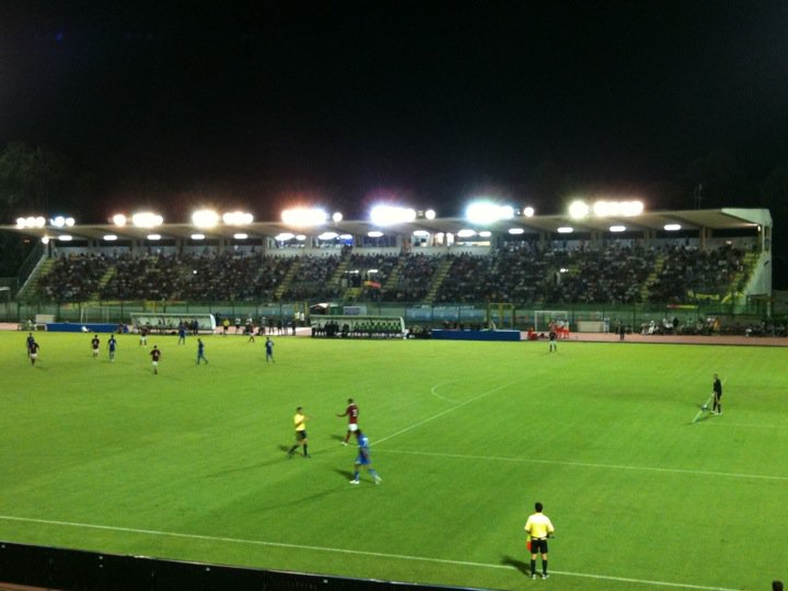 Partita U21 Italia - Danimarca allo Stadio dei Pini "Torquato Bresciani" di Viareggio